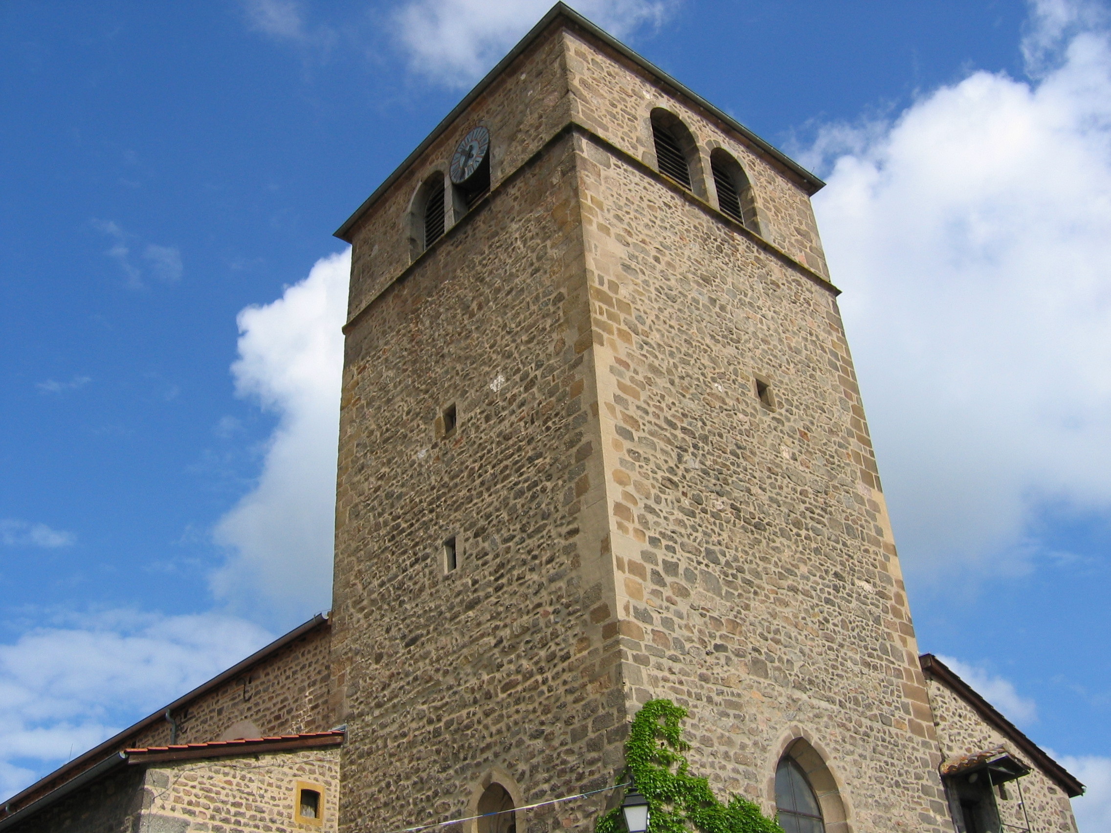 Le clocher d'Haute Rivoire (Rhône)